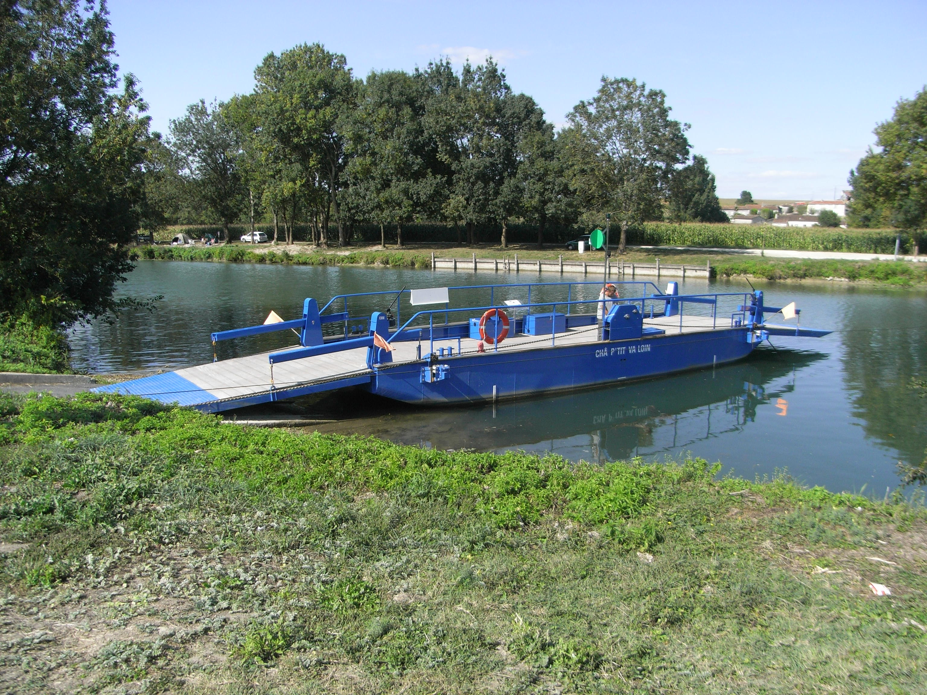 Le "Châ p'tit va loin", dernier bac à chaine français à manoeuvres manuelles sur la Charente entre Dompierre-sur-Charente et Rouffiac (Charente-Maritime).